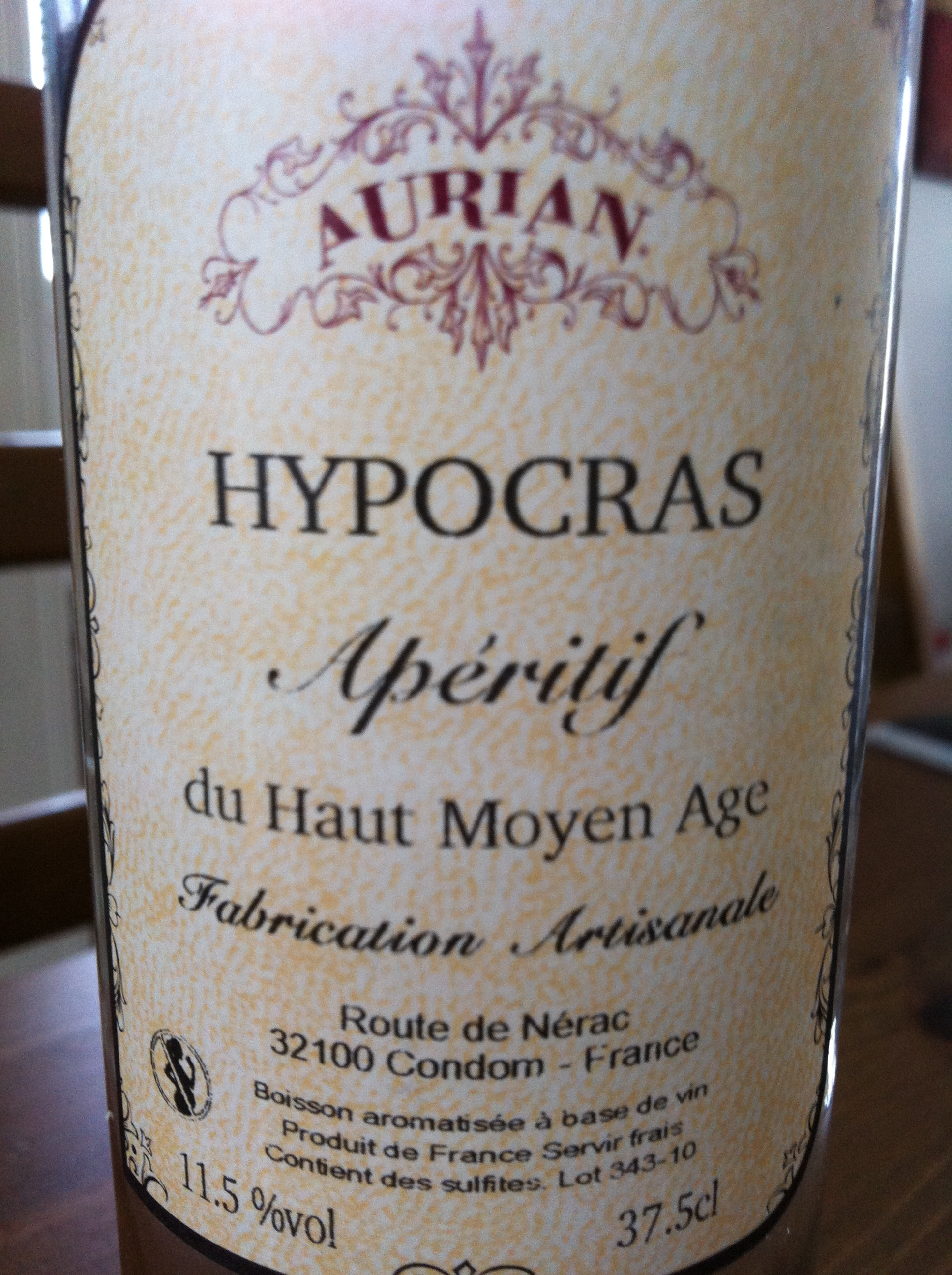 Etiquette d'une bouteille d'Hypocras produite à Comdom (Gers).